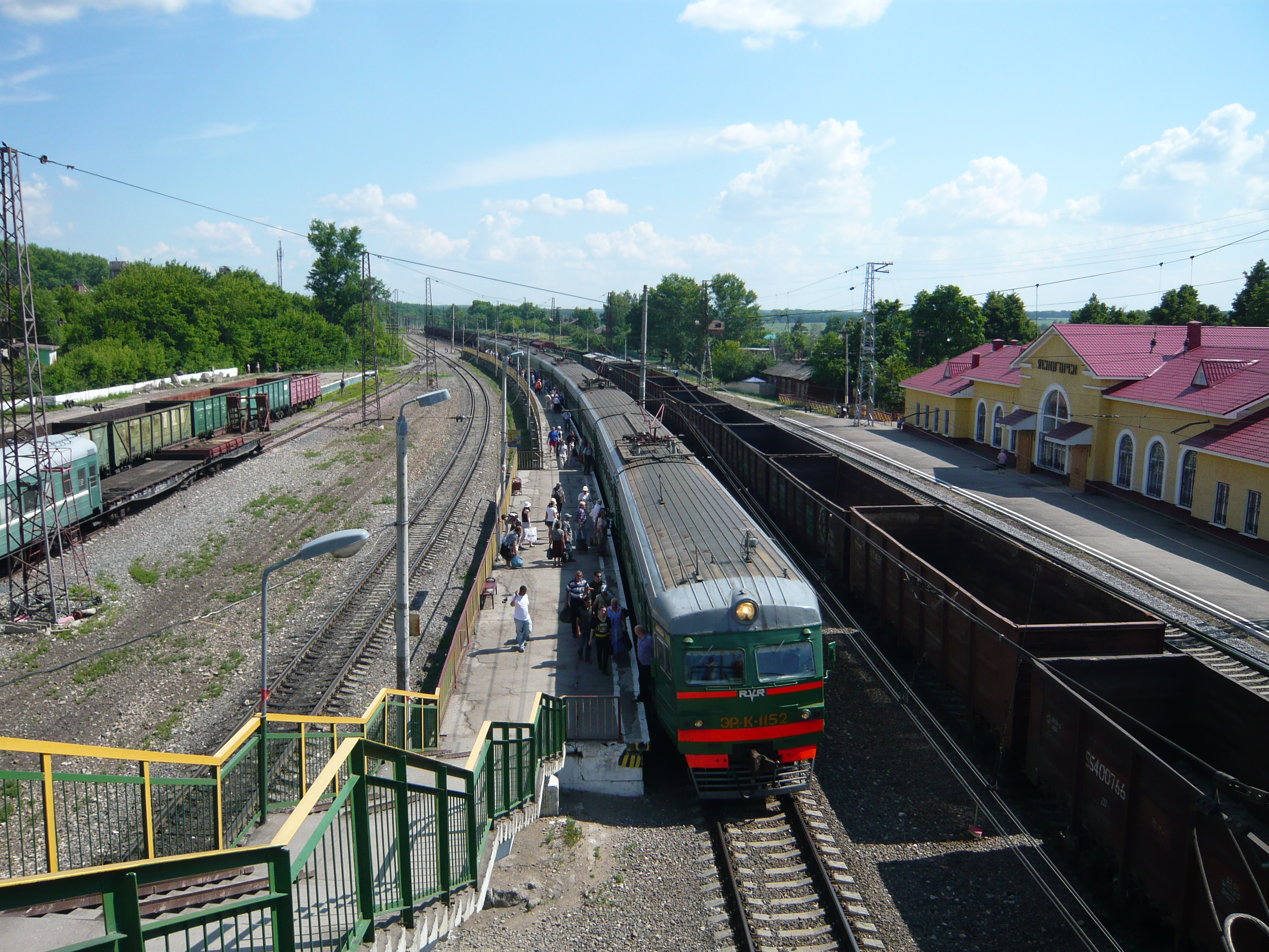 Станция Ясногорск МЖД